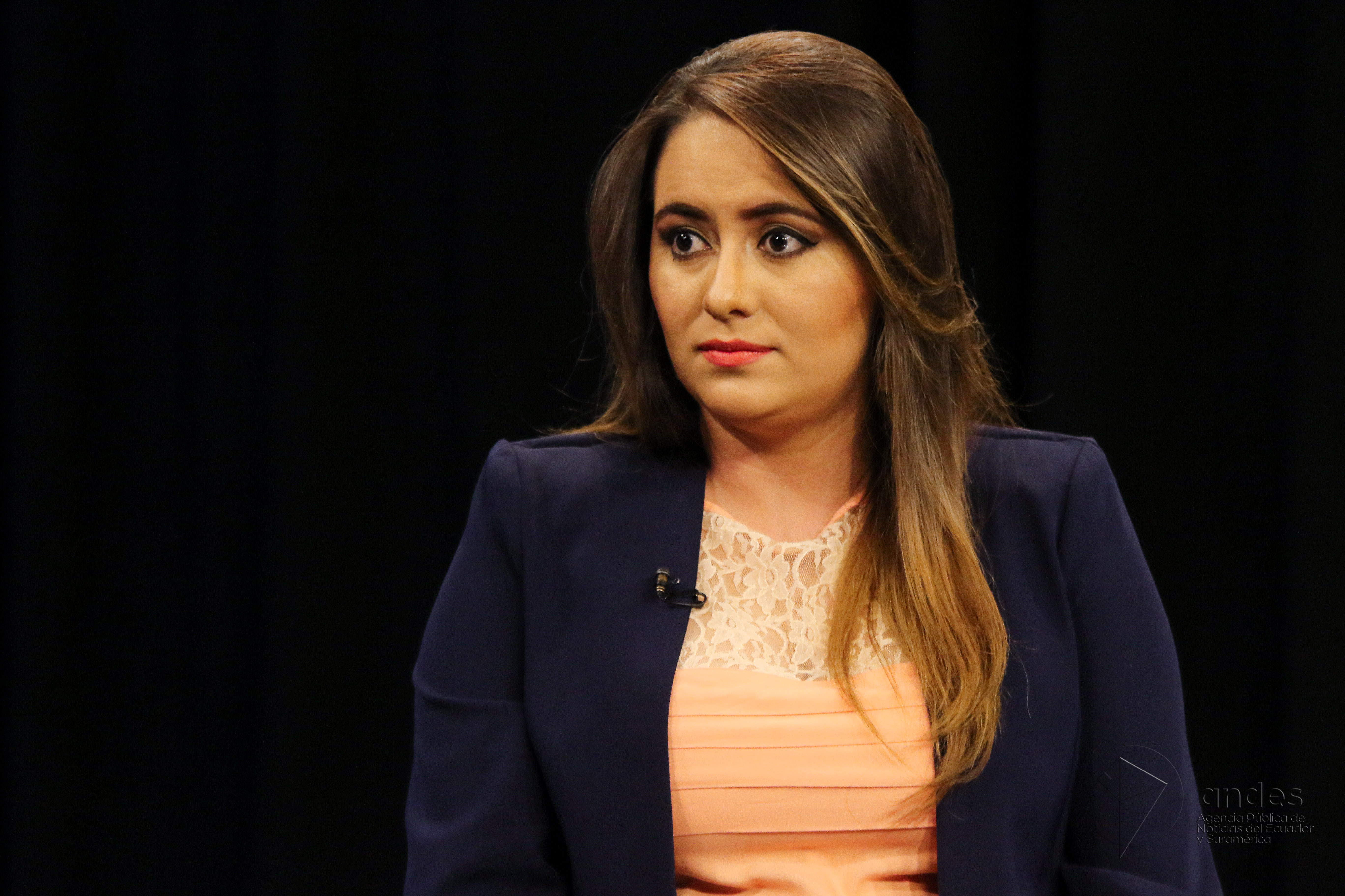 7 de Jul (Andes).- Verónica Artola, gerente del Banco Central del Ecuador otorga una entrevista al programa Ecuador No Para, conducido por Marco Antonio Bravo. Fotografías: Carlos Rodríguez/Andes.